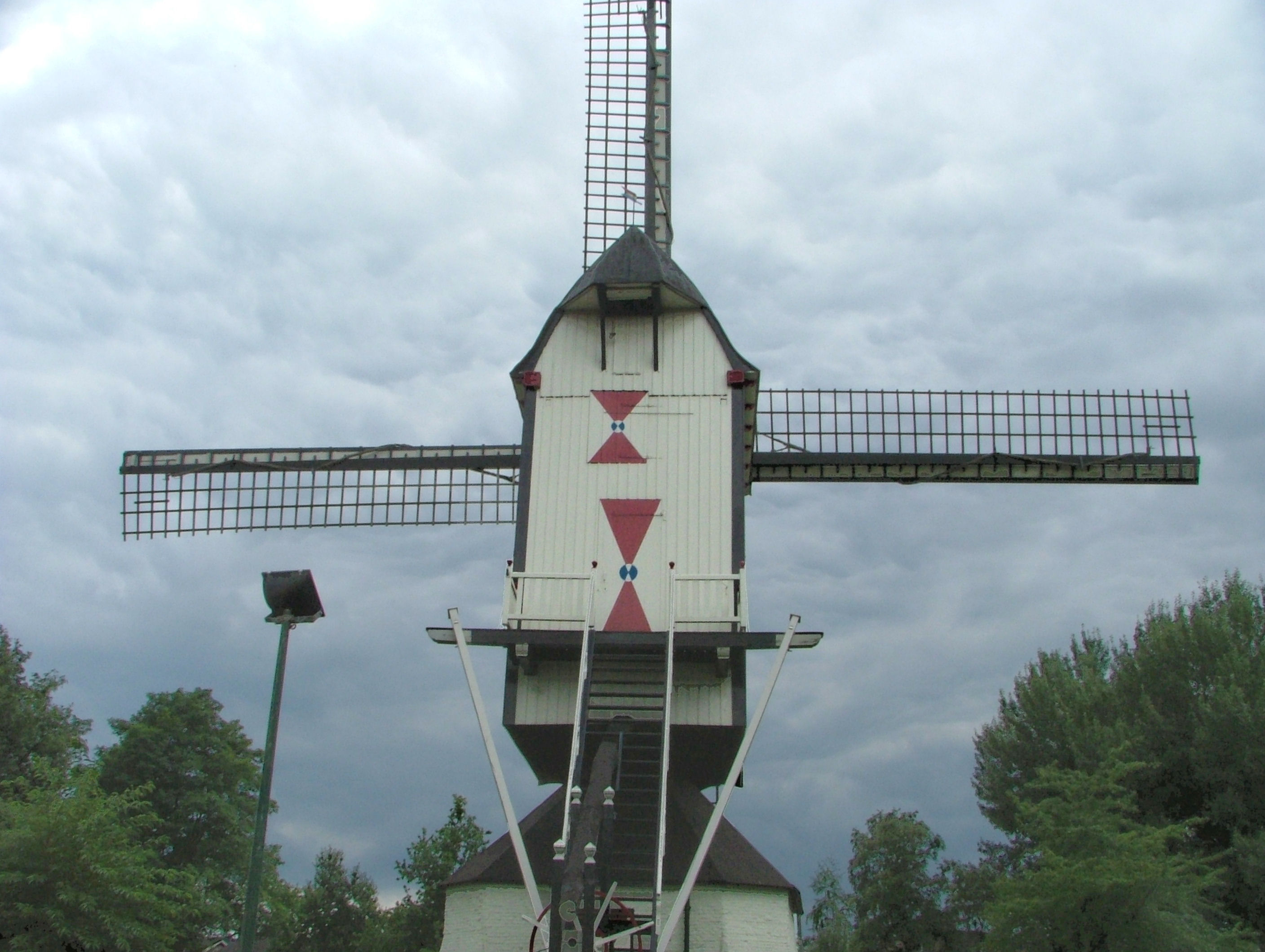 Standerd Molen Rosmalen